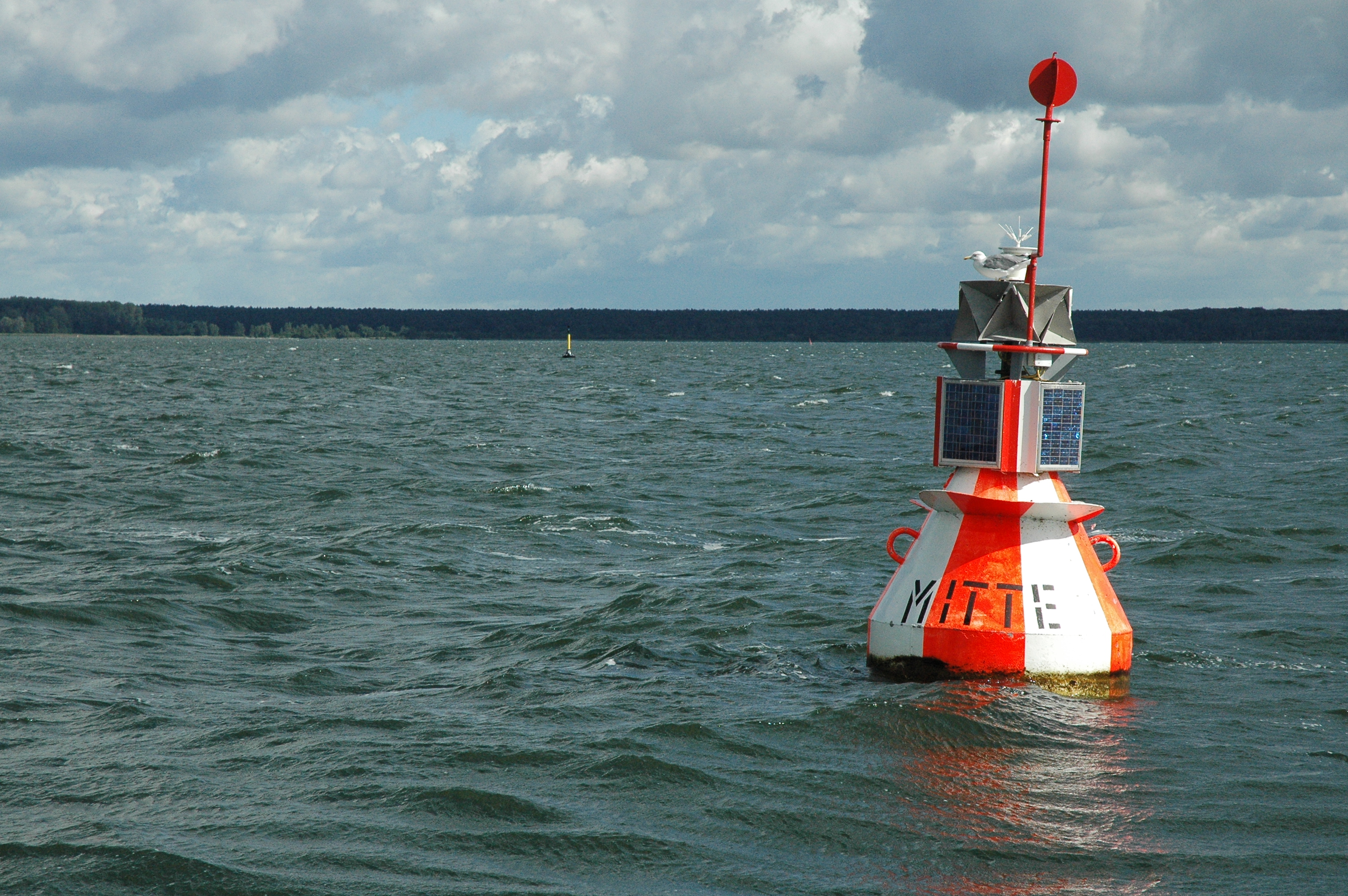 Ansteuerungstonne Müritz-Mitte